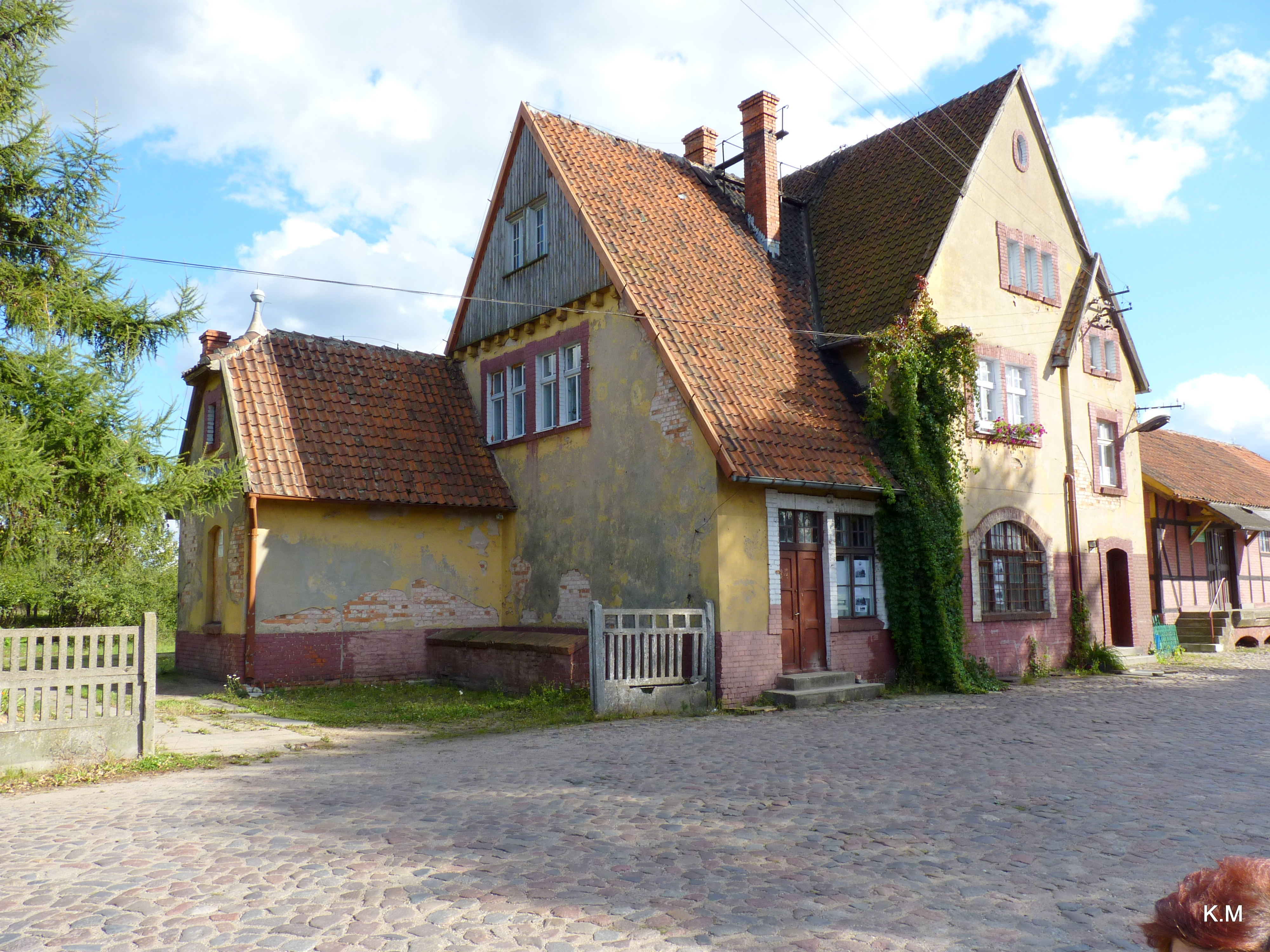 Koronowo - widok nieczynnej stacji PKP